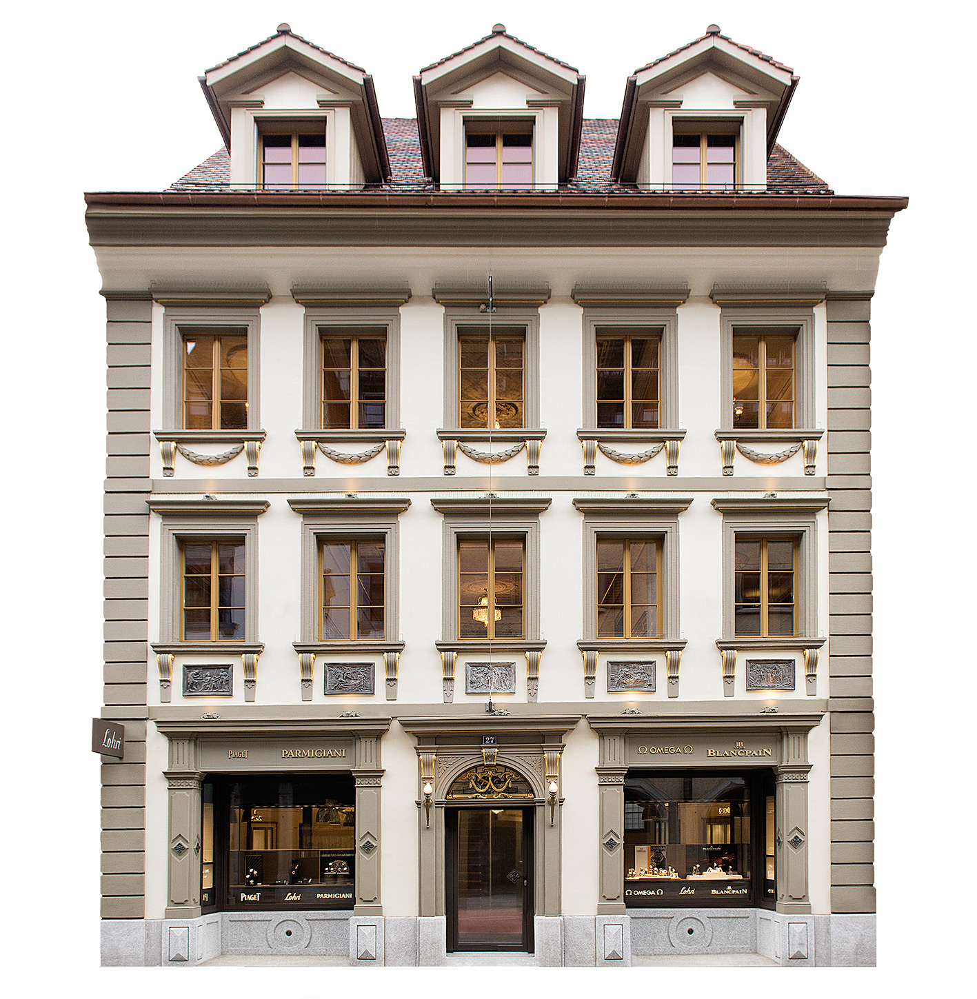 Lohri-Hause Fassade